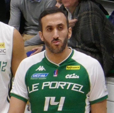 Mohamed Hachad avec Le Portel - Basket-ball